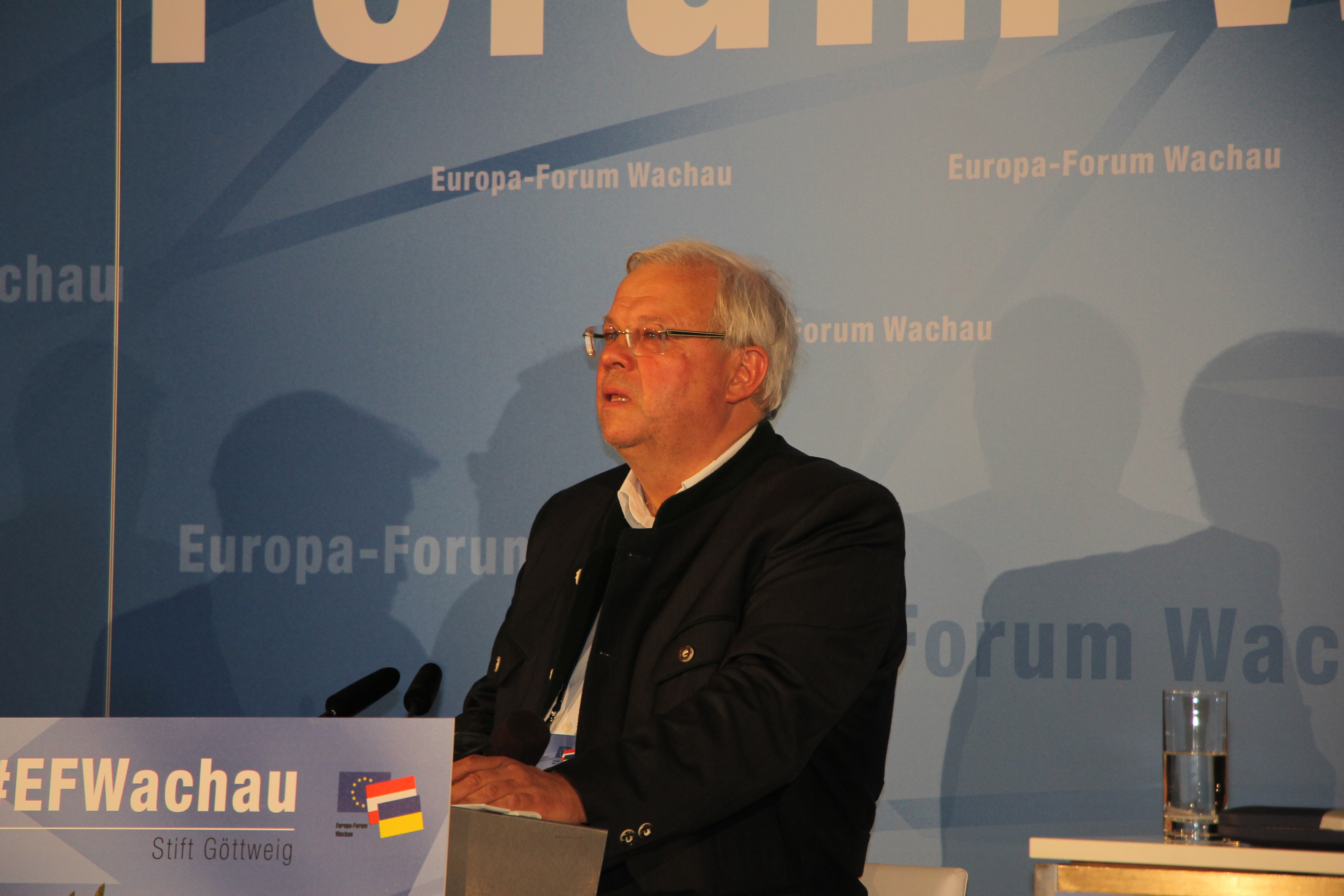 Europaforum Wachau 2018 auf Stift Göttweig